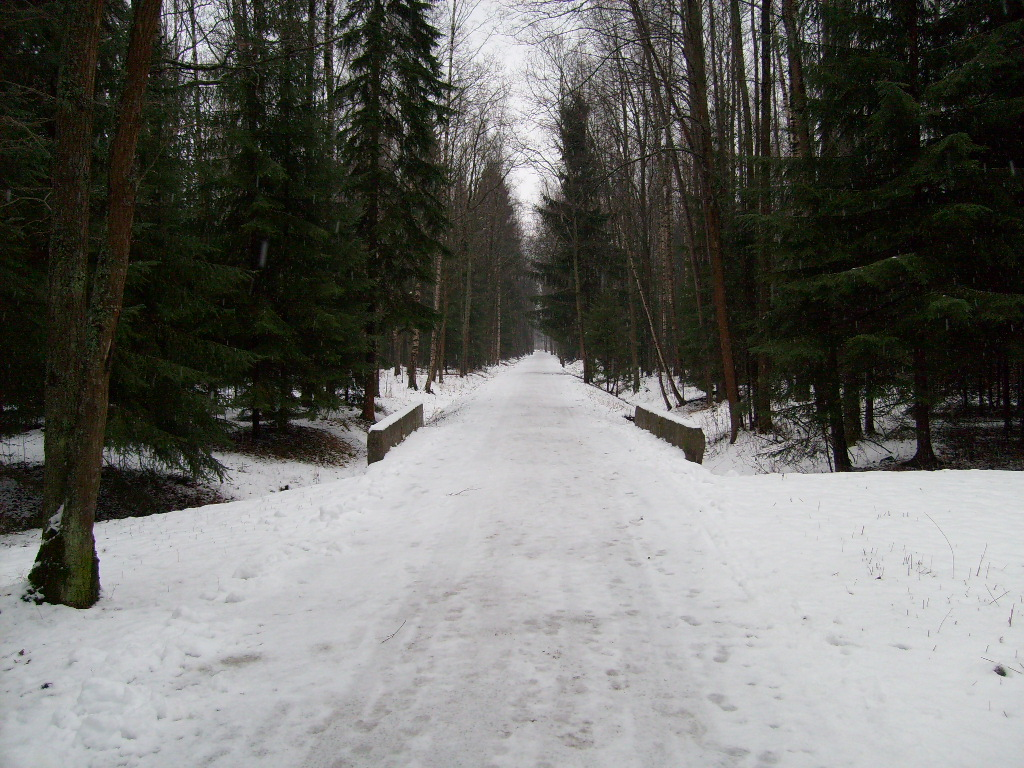 Парк Сергиевка